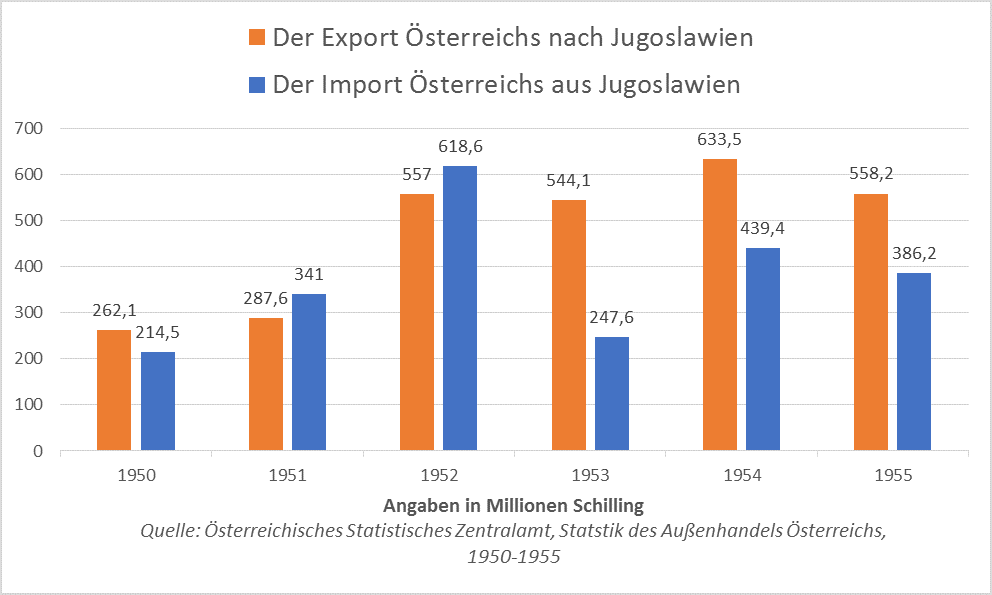 Importe und Export zwischen Österreich und Jugoslawien von 1950 bis 1955